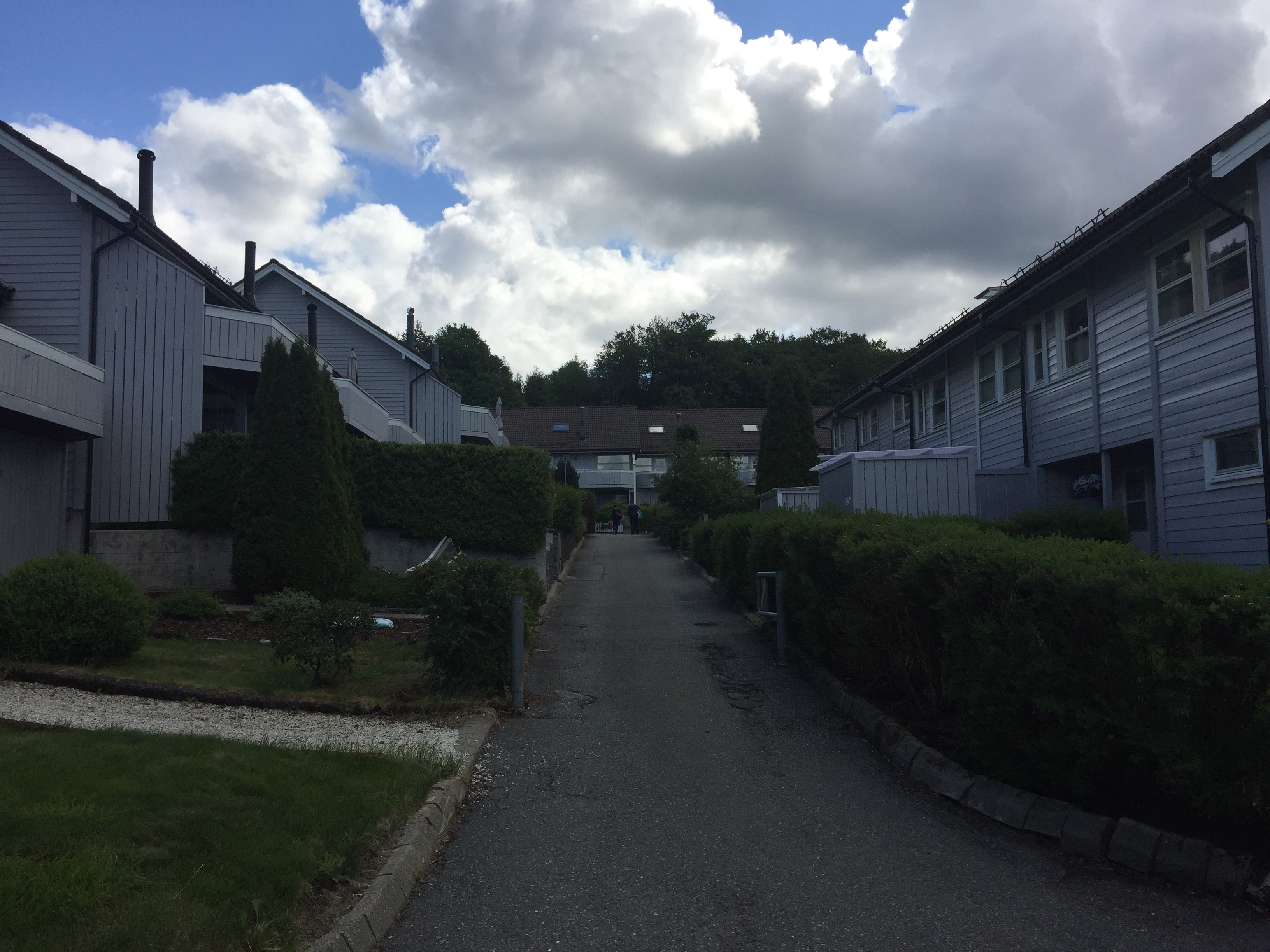 Gatetun i Dortledhaugen 122 til 156